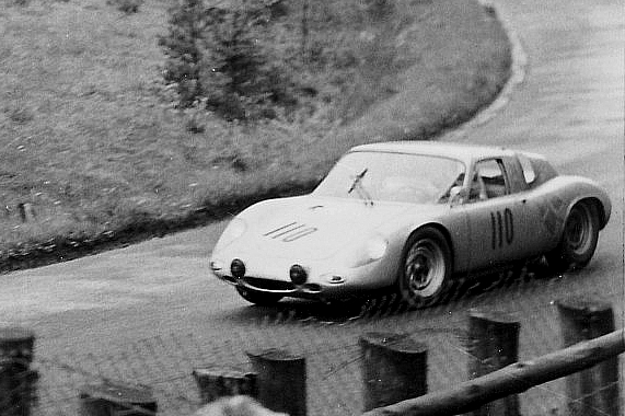 1000-km-Rennen auf dem Nürburgring 1962. Porsche 718 GTR, gefahren von Joakim Bonnier, gegen Schluss des Rennens in der Südkehre. In der 43. bzw. vorletzten Runde fiel Bonnier aus. Eigenes Foto, von altem Papierbild gescannt